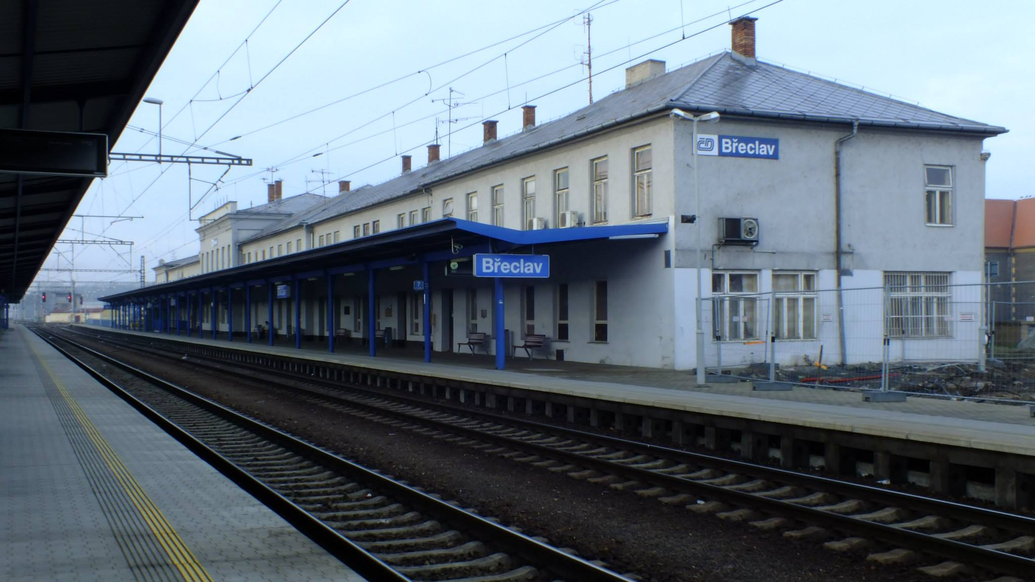 Nádražní budova